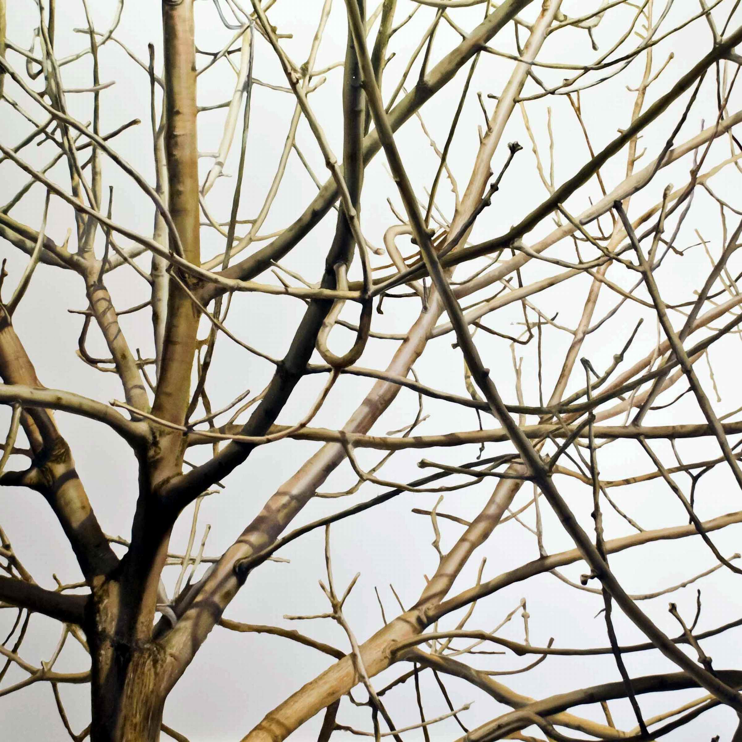 CRUZAMIENTO